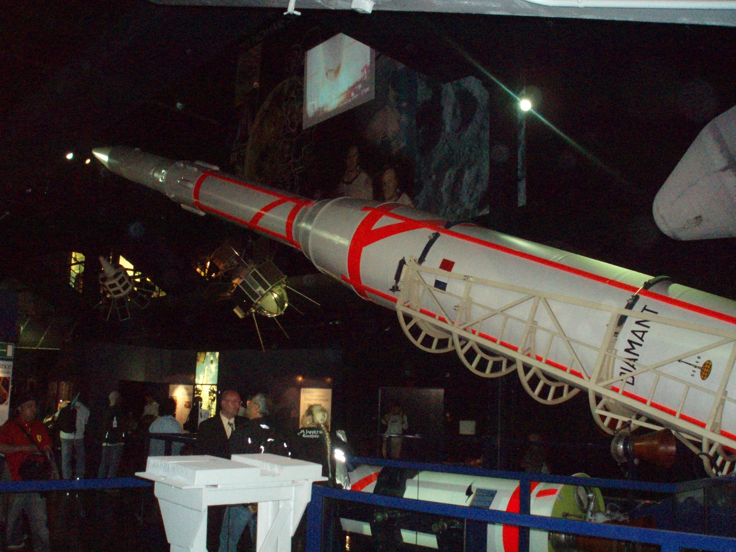 Fusée Diamant